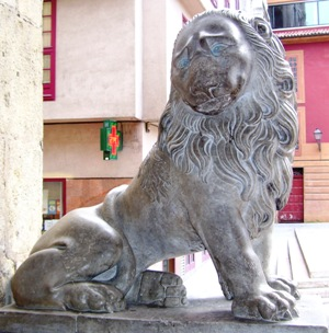 Estatua de león del Ayuntamiento de Oviedo. Posiblemente de la misma época del edificio construido en el siglo XVII